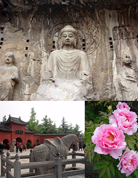 洛阳